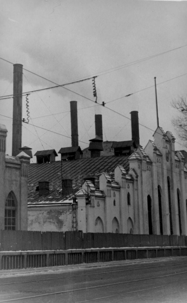 Беларуская (тарашкевіца): Менск (Miensk), вуліца Захараўская (vulica Zacharaŭskaja) каля скрыжаваньня з Садовай (vulica Sadovaja). Першая менская электрастанцыя